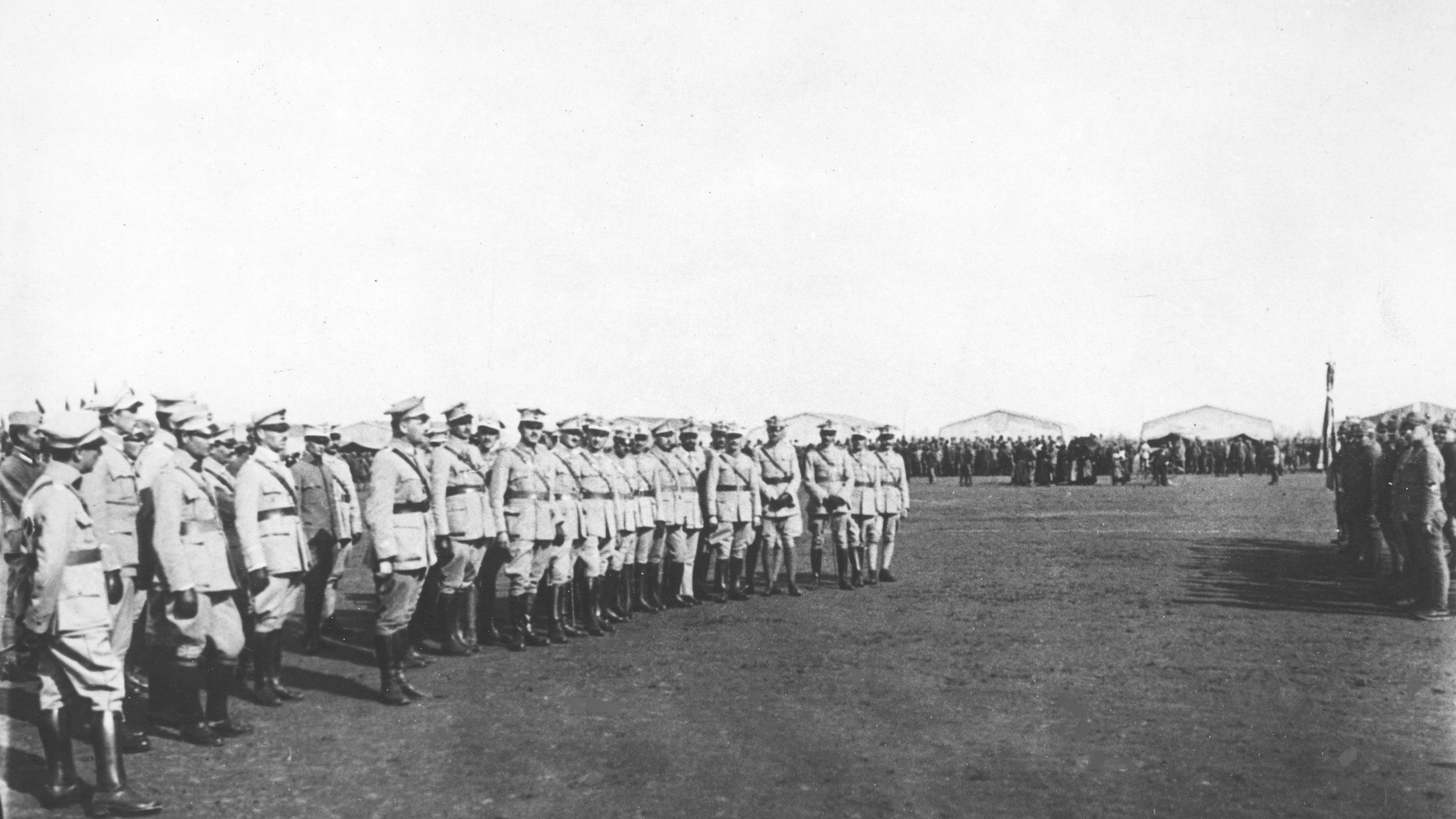 Polski obóz wojskowy w La Mandria di Chivasso. Przemówienie podpułkownika Dienstl-Dąbrowy w czasie przyjmowania sztandarów ofiarowanych przez miasta włoskie. Koncern Ilustrowany Kurier Codzienny - Archiwum Ilustracji. Sygnatura: 1-H-280-8